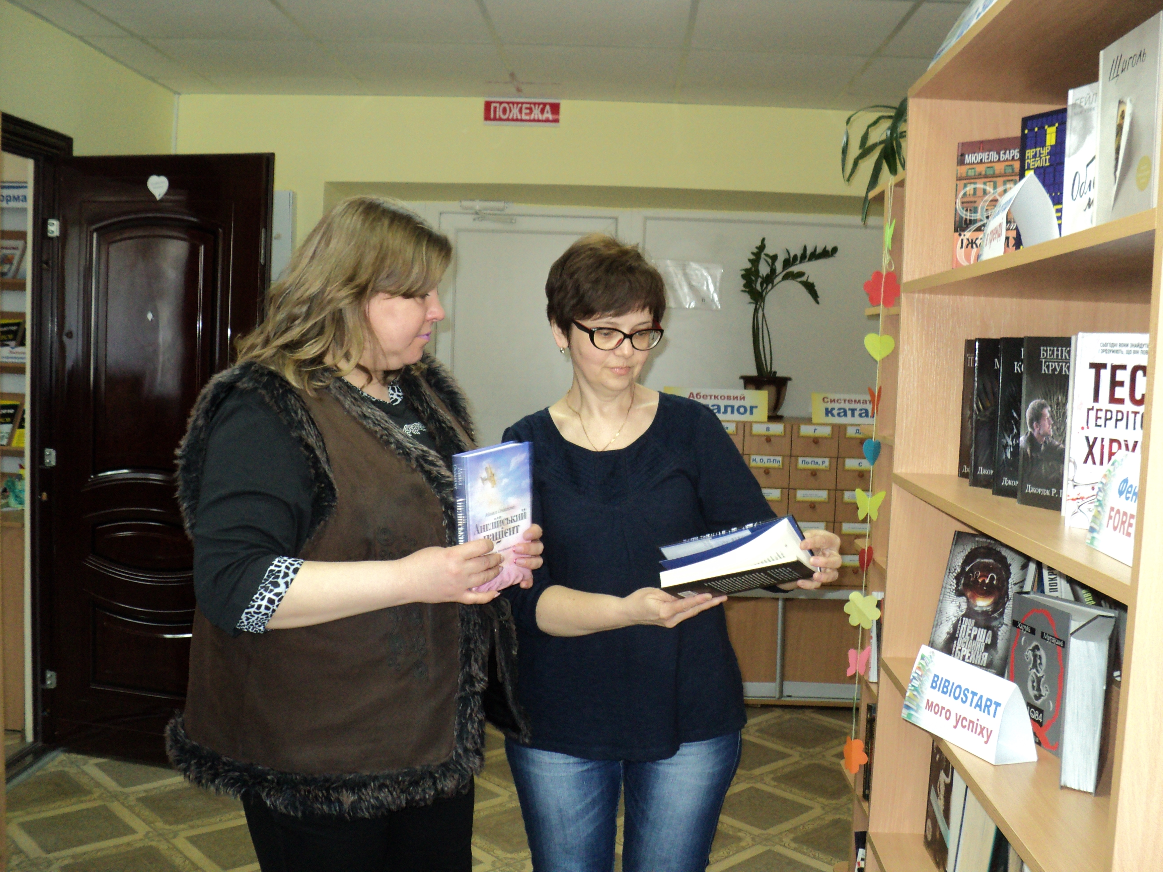 Обслуговування на абонементі